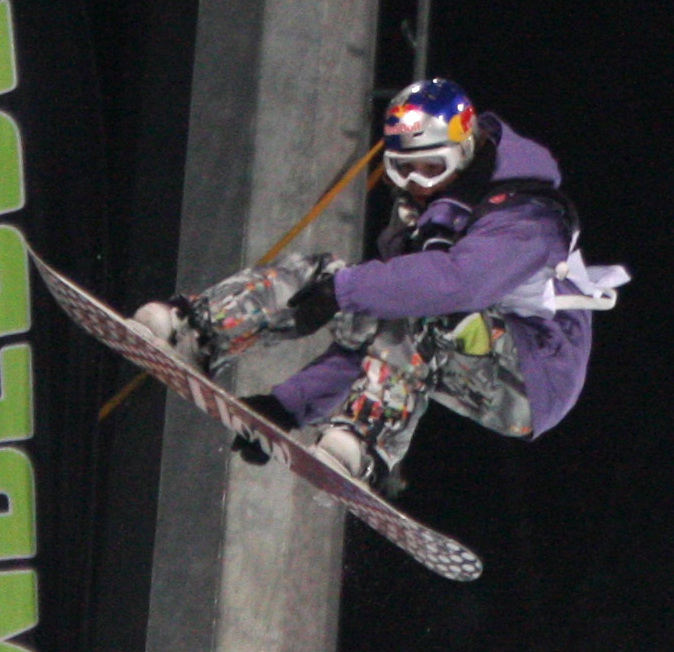 Kreischberg_HP_Sarka_Pancochova_CZE